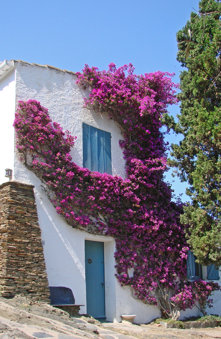 Maison de pêcheur proche de la maison de Dali et Gala à Portlligat près de Cadaqués (Photo Annie Dalbéra) En 1930, Dali achète à Lidia Noguer une première cabane de pêcheur, très rapidement il en achète une seconde puis au cours des années il fait construire selon ses propres plans des parties complémentaires pour en arriver à la maison actuelle dont les pièces sont étagées sur plusieurs niveaux. Il achète également les terrains autour et au-dessus de la maison pour aménager des terrasses plantées d'oliviers et y installer des oeuvres. Cette maison, le site de Cadaqués - Portlligat et la région du cap Creus sont intimement liés à l'oeuvre de Dali, ce sont des sources d'inspiration qui traversent toute son oeuvre. Source : Ouvrage "Dali de Gala", par Robert Descharnes, Edita SA Lausanne, 1962) et guide de la maison-musée Salvador Dali, Antoni Pitxot, Montse Aguer, Jordi Puig, Fondation Gala-Salvador Dali, Triangle Postals, SL, 2008 Le site de la fondation